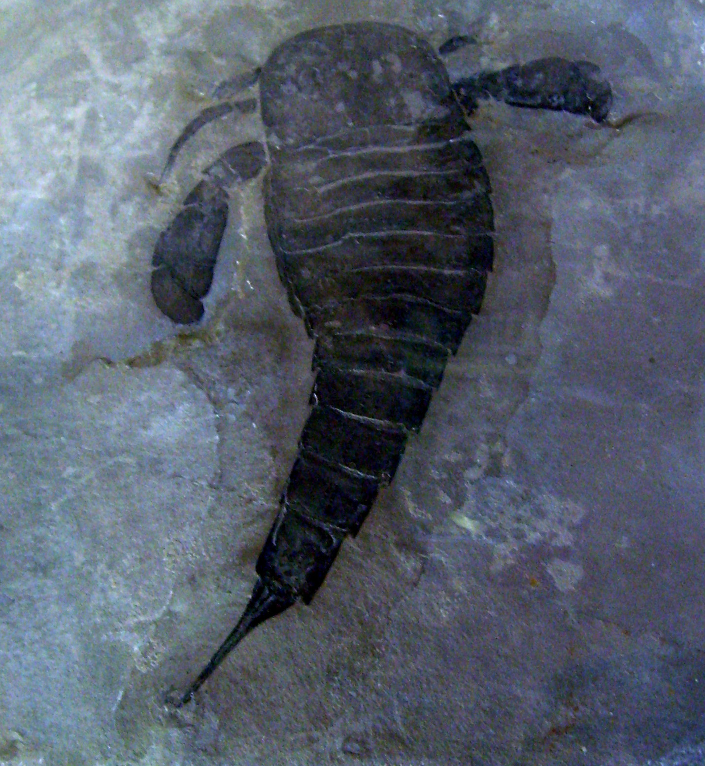 Eurypterus lacustris fossil, Muséum national d'histoire naturelle, Paris.